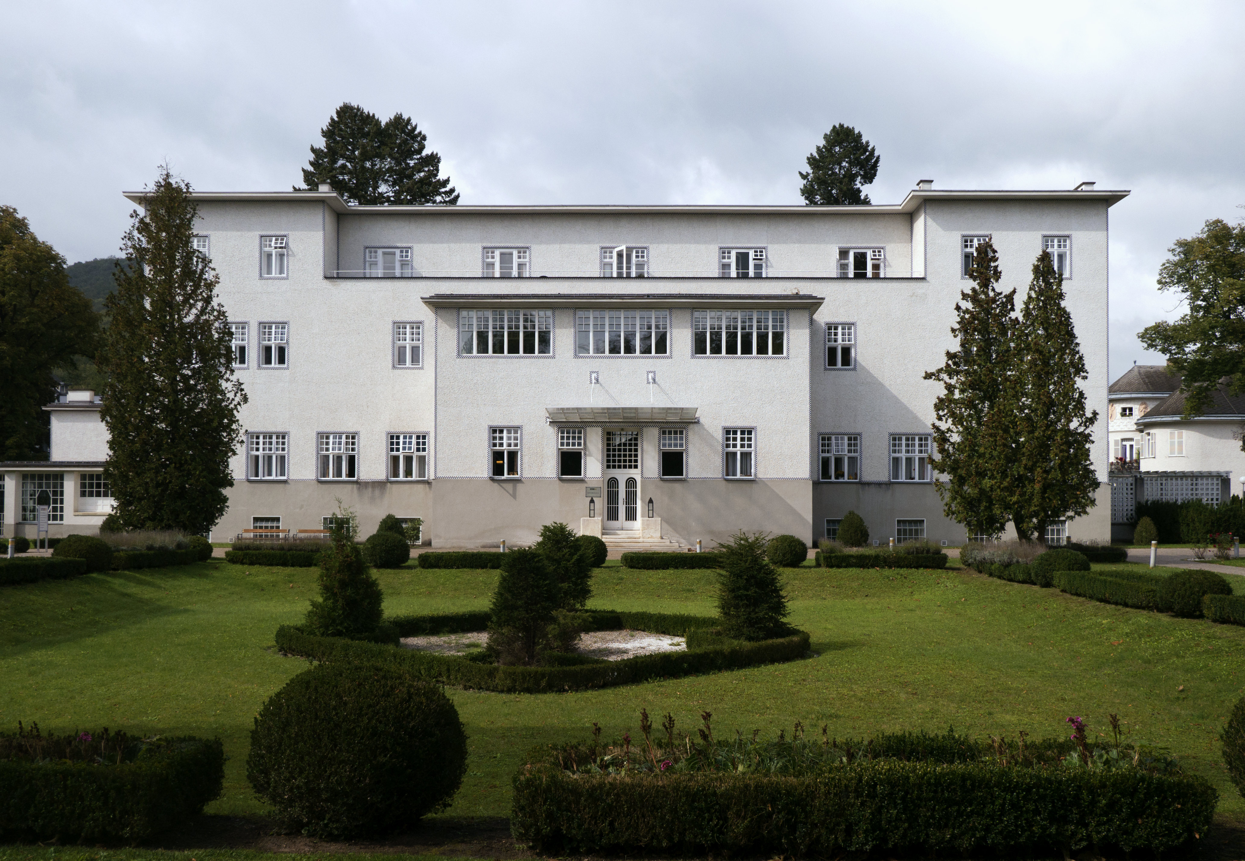 Ehemaliges Sanatorium Westend